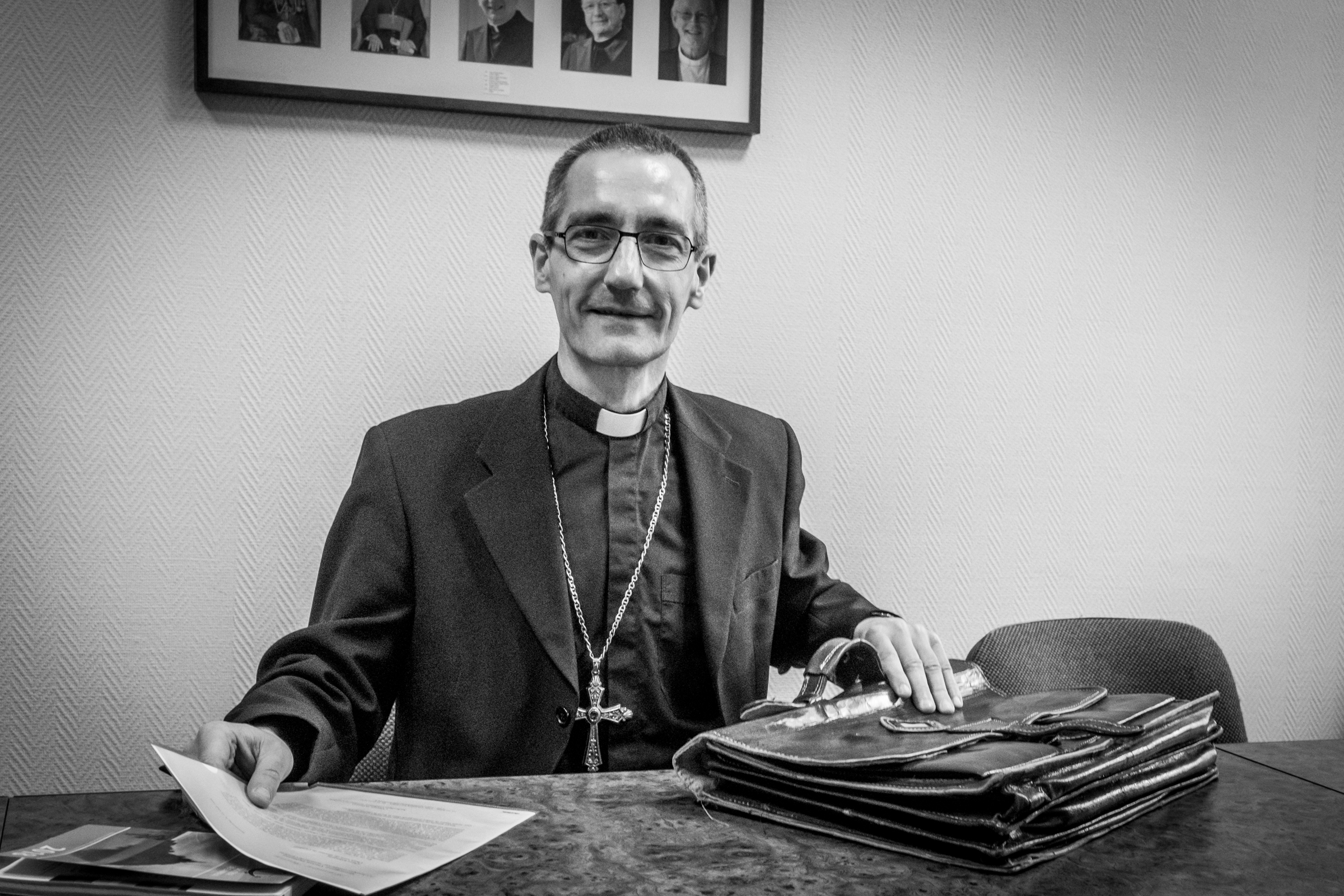 Vincent Dollmann par Claude Truong-Ngoc